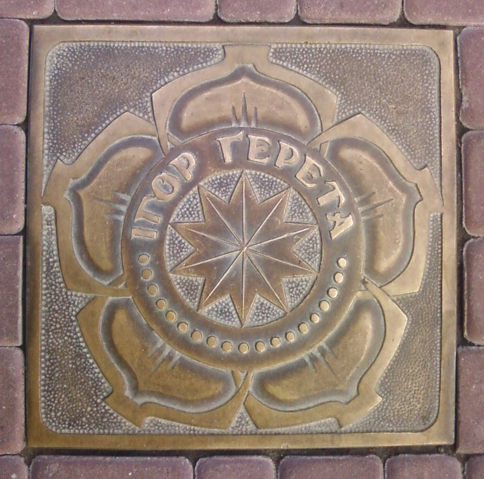 Пам’ятний знак на честь Ігора Ґерети у Тернополі.